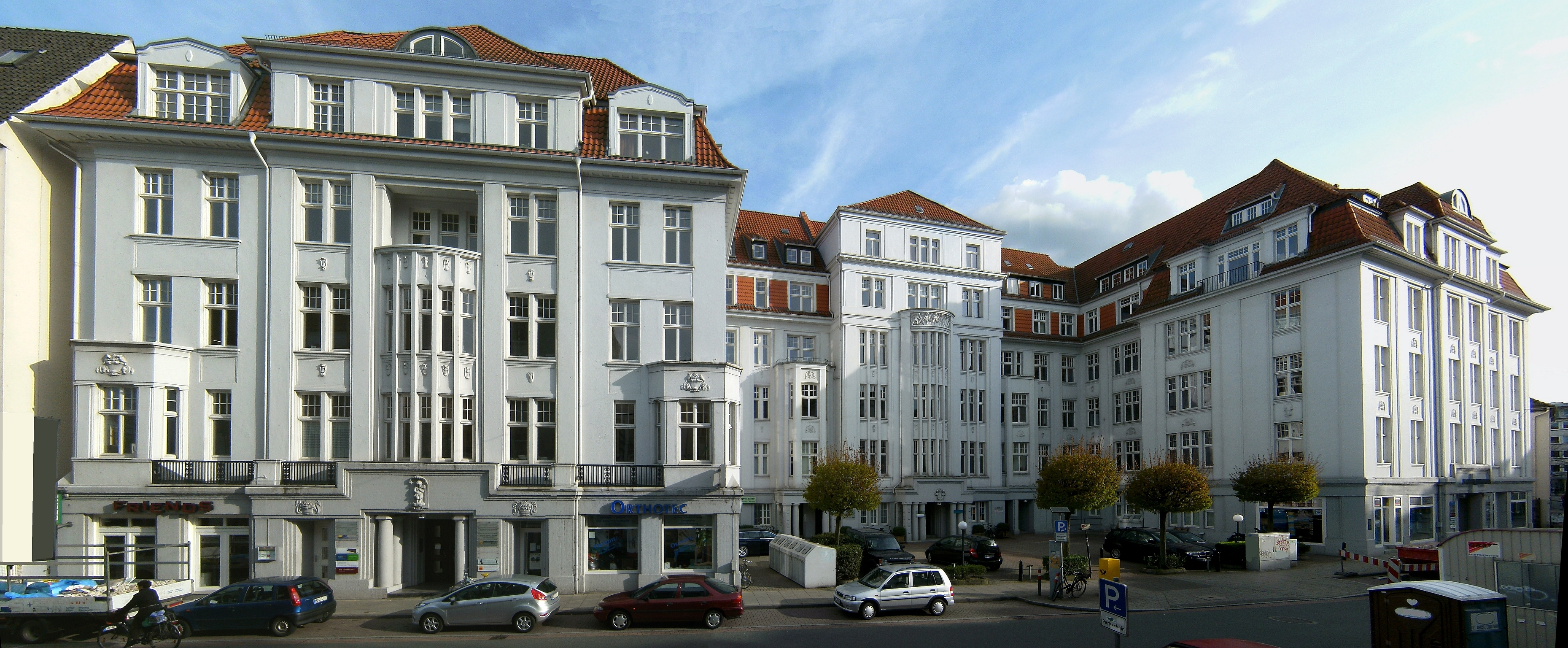 Remberti-Kontorhaus in Bremen, Rembertistraße 28-32.Das abgebildete Objekt ist ein geschütztes Kulturdenkmal in der Freien Hansestadt Bremen, mit der Nr. 1032 beim Landesamt für Denkmalpflege registriert.